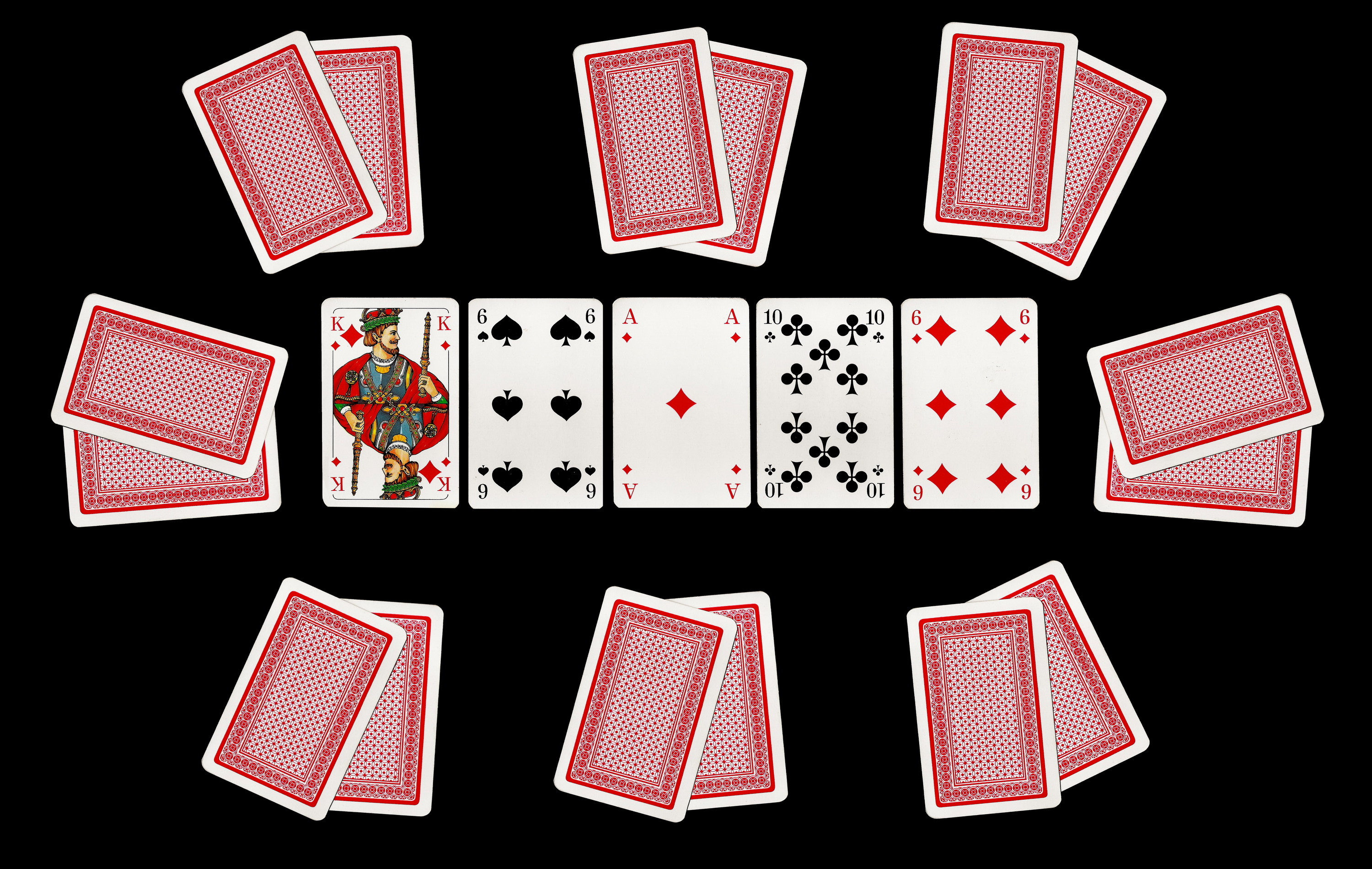 Poker - Karten beim Texas Hold'em für eine komplette Runde samt Tischkarten